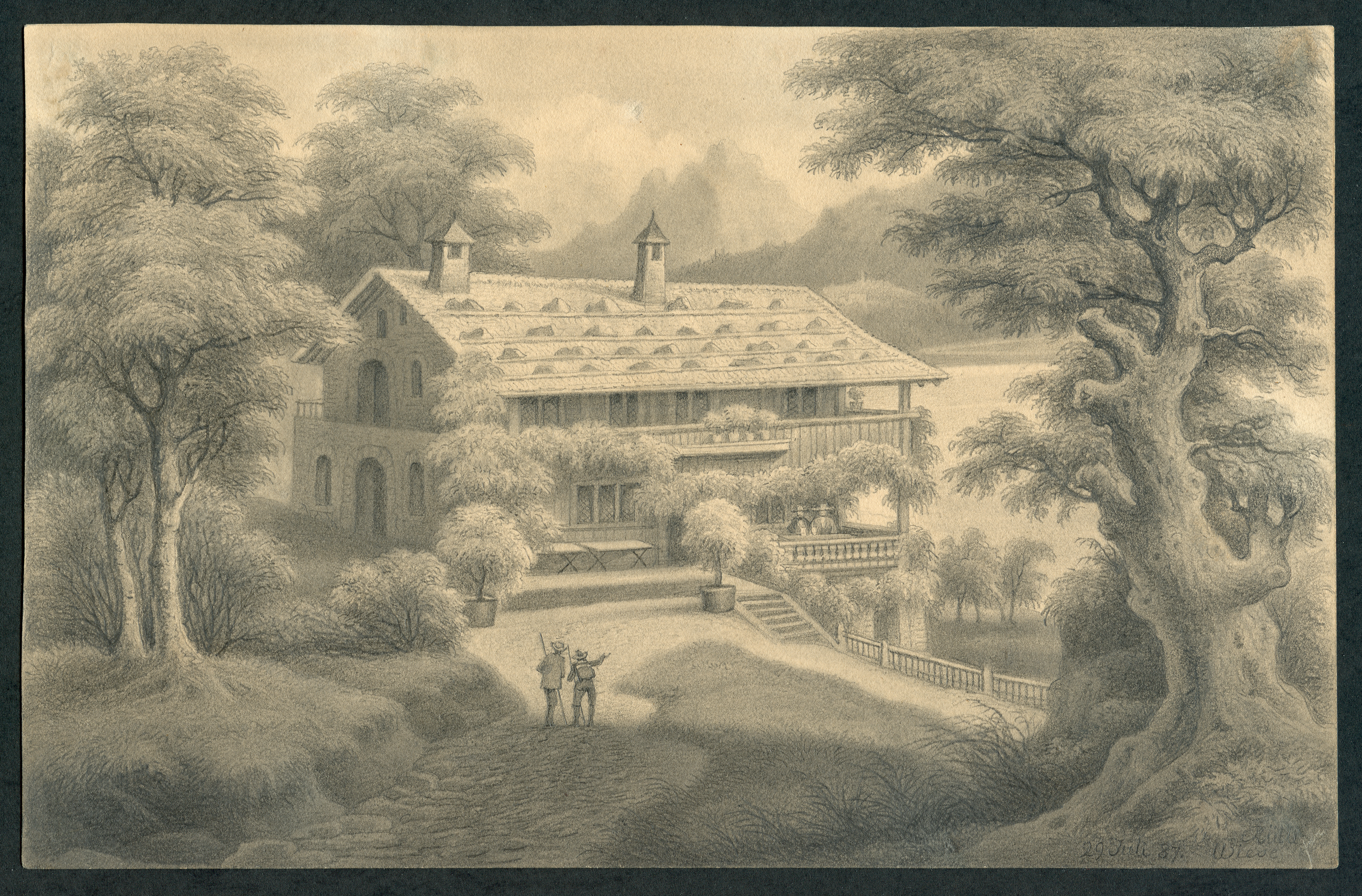 Bleistiftzeichnung (Hand-Skizze) der Rütliwiese (Rütli Wiese), gezeichnet während einer Schweiz-Reise von (Johann Heinrich) Wilhelm Kretschmer; aus einem Album (gewidmet 1889 an seinen Sohn Heinrich, mit dem er die Reise unternommen hatte). Aus einem von zwei (nahezu un-)bekannten Alben des Künstlers, der unter anderem und insbesondere in Hannover als Zeichenlehrer einen bleibenden Namen gemacht hat für seine präzisen naturalistischen Werke.